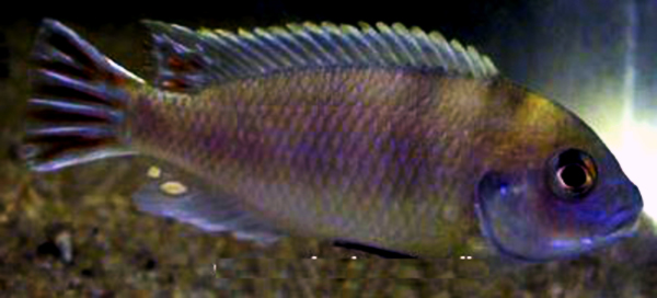 Maylandia livingstonii Malawi chiclide